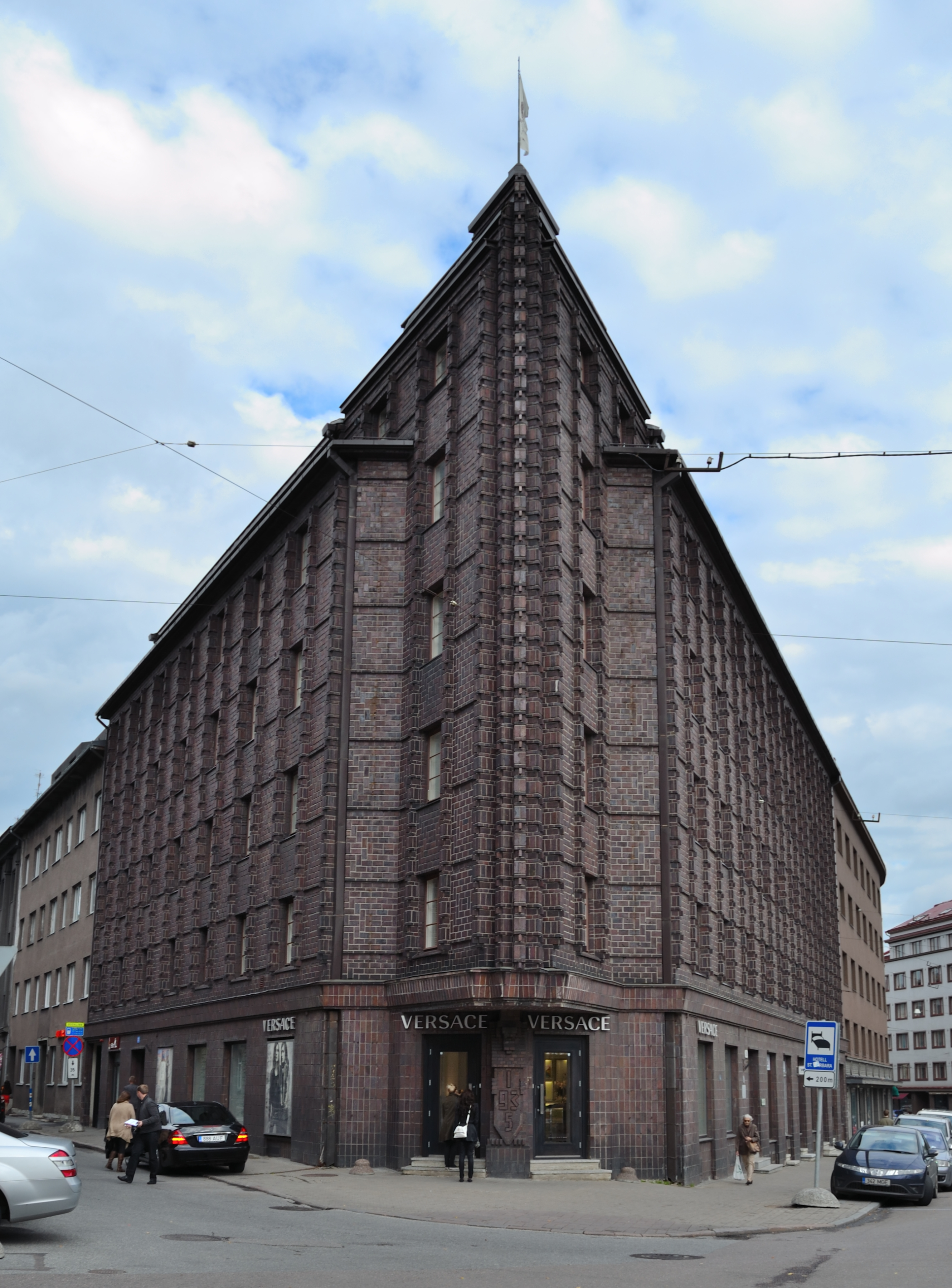 Tallinn, elamu Pärnu mnt 36-Roosikrantsi 23, 1935